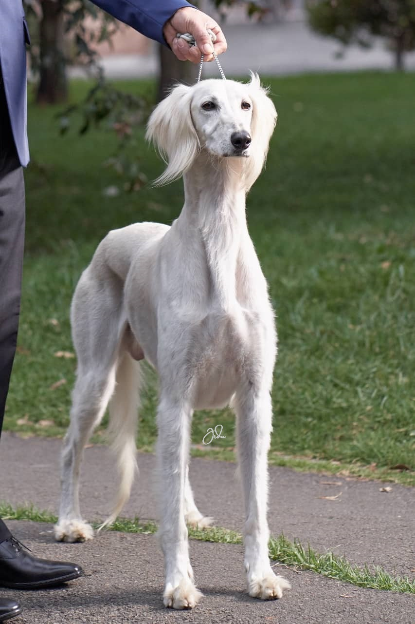 SALUKI DOG